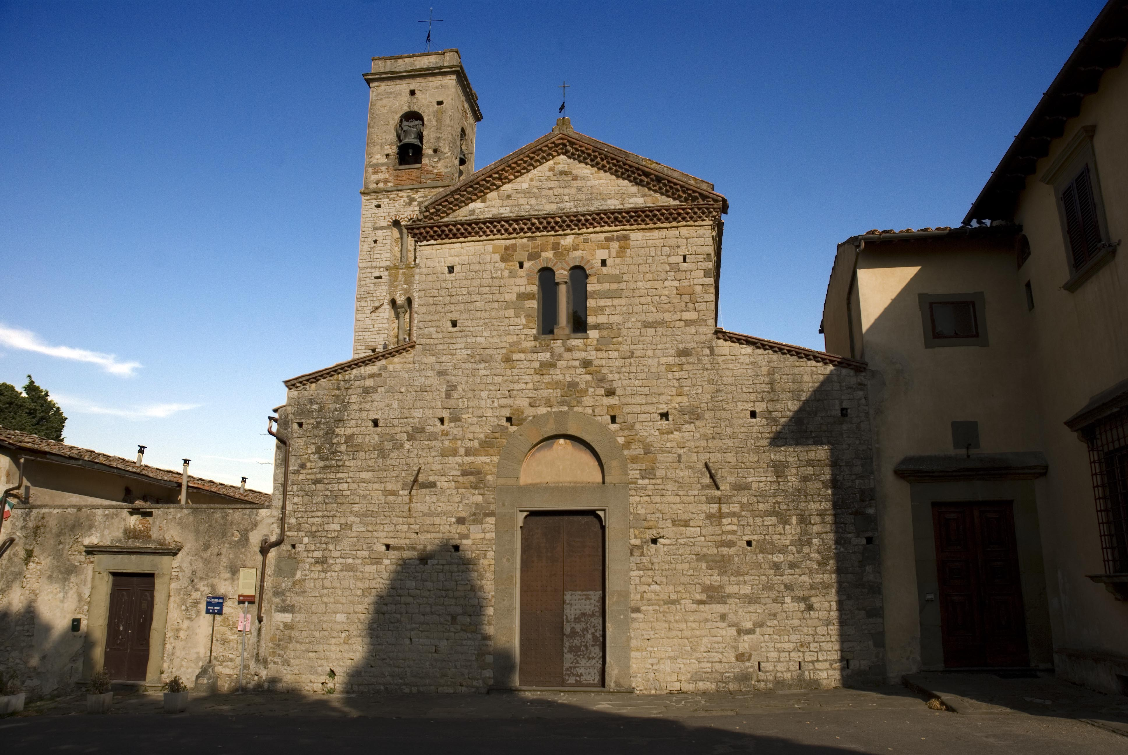 Chiesa di Sant'Alessandro a Giogoli